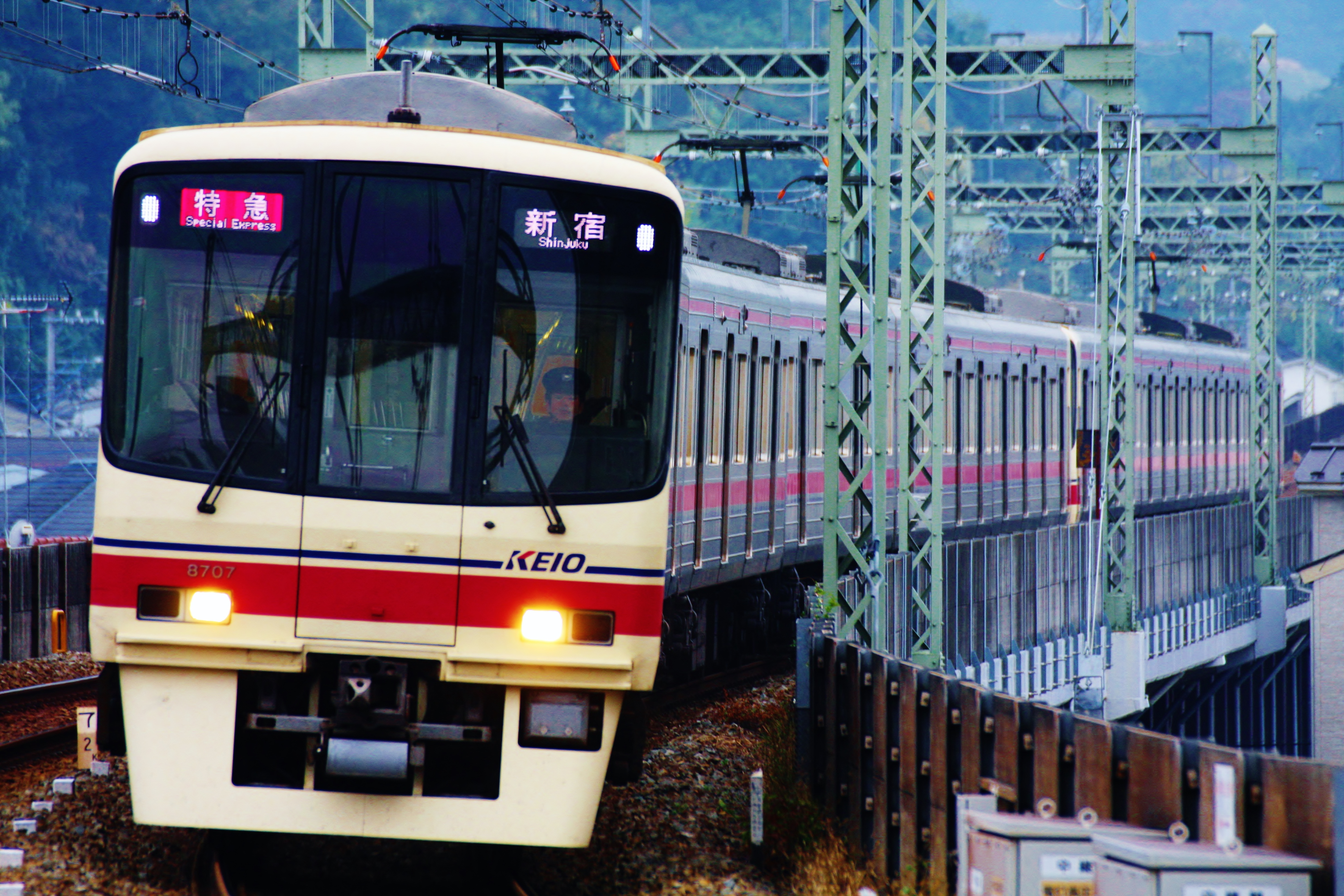 京王稲田堤駅に到着する8000系特急新宿行